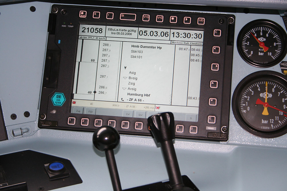 EBuLa-Display (Führerstand der Baureihe 185)